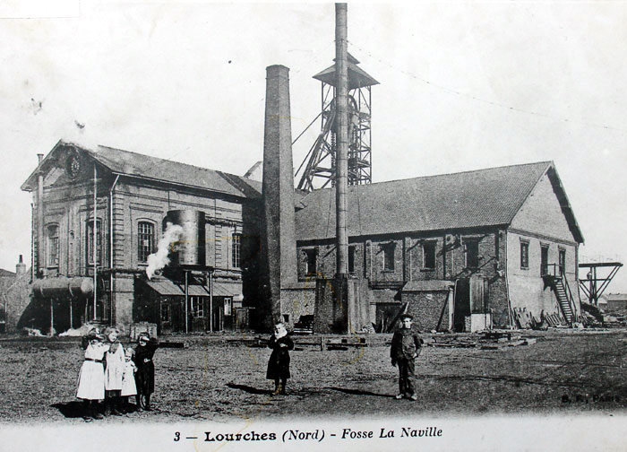 Ancienne fosse La Naville de Lourches aujourd'hui disparue